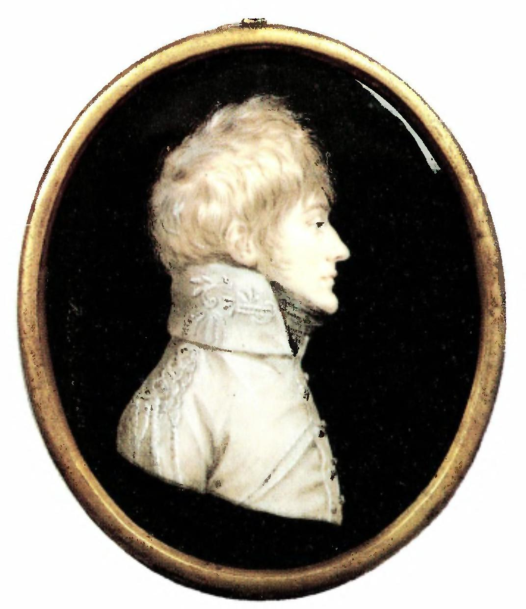 Тизенгаузен, Ф.И.